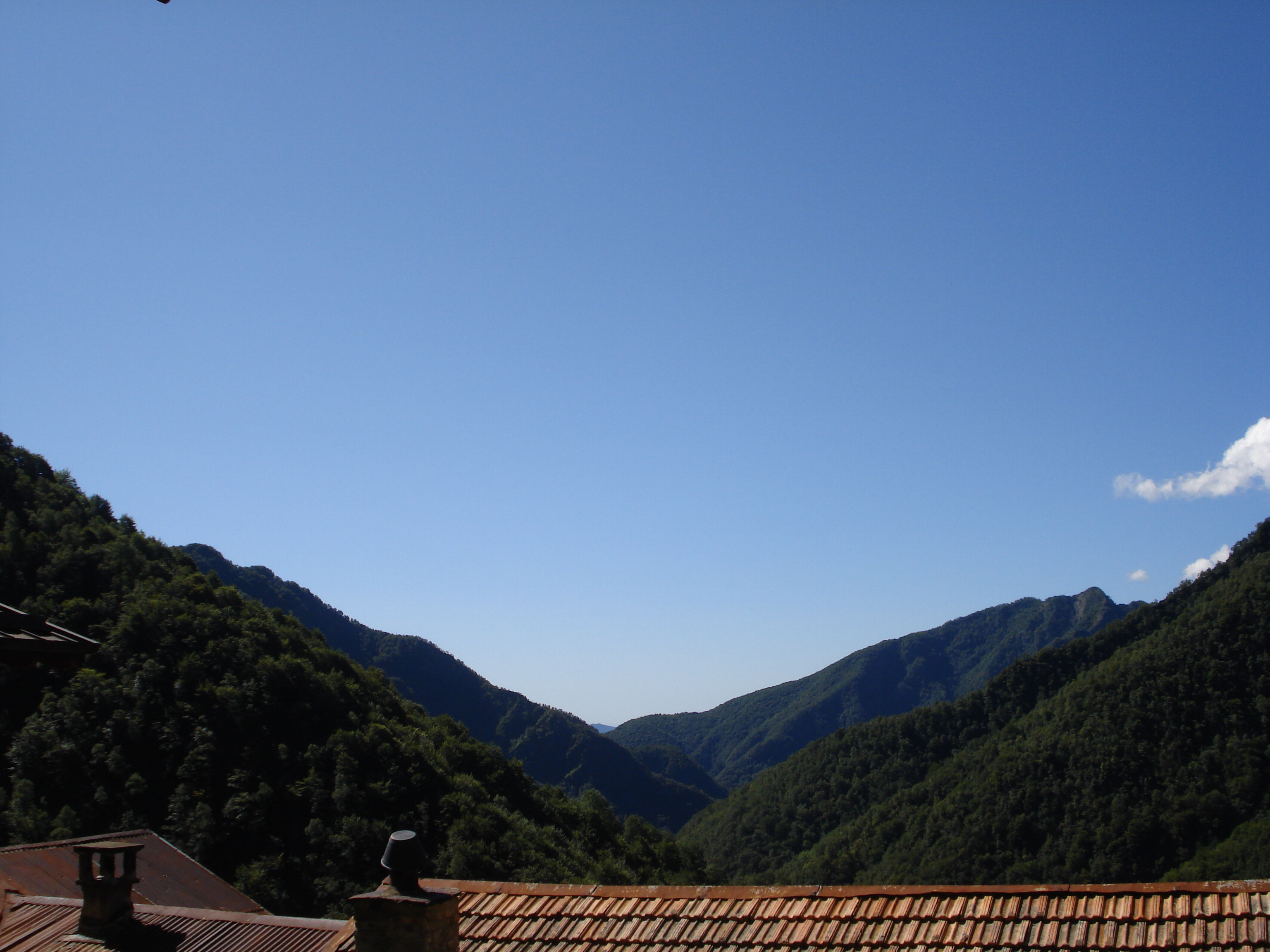 Comune di Sabbia, Vercelli